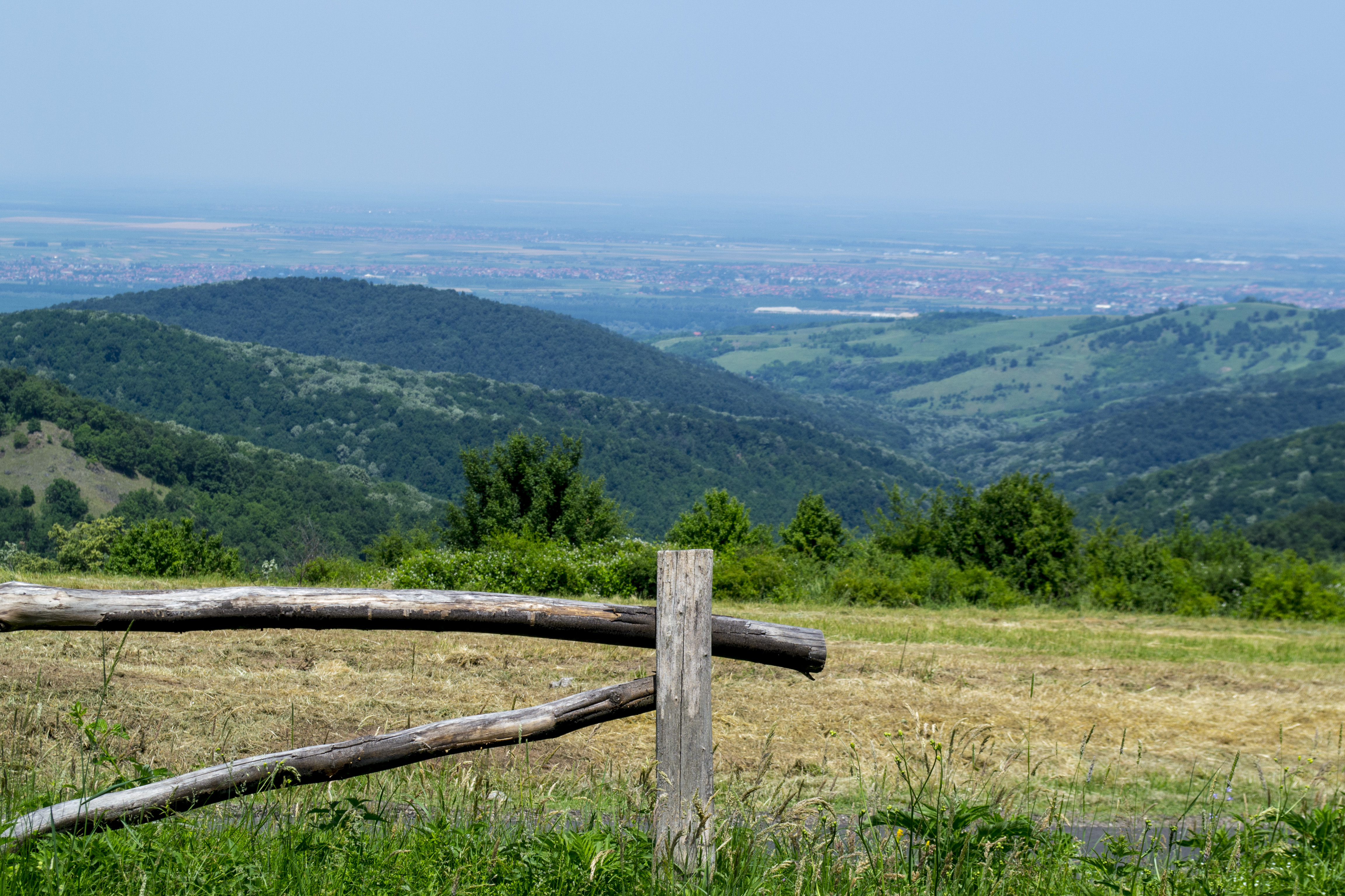 Ово је фотографија заштићеног природног добра у Србији под шифром: НП01This is a a photo of a natural area in Serbia with ID: НП01 Odmaraliste Zmajevac